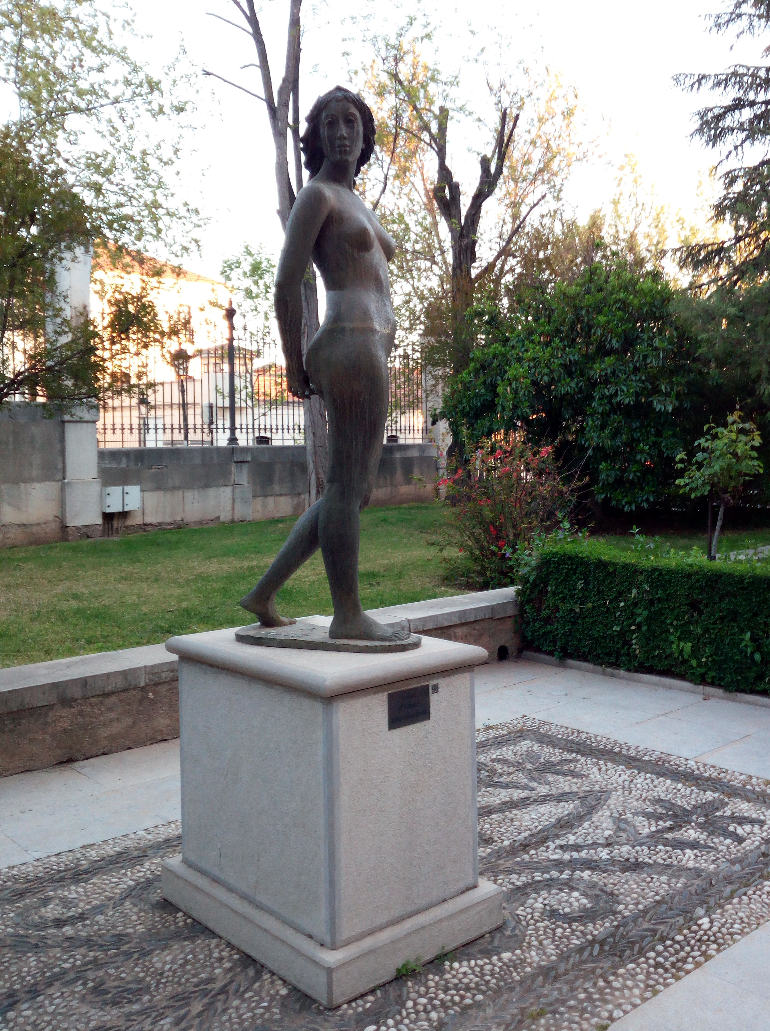 Escultura ubicada en los jardines de acceso del Hospital Real. Universidad de Granada.